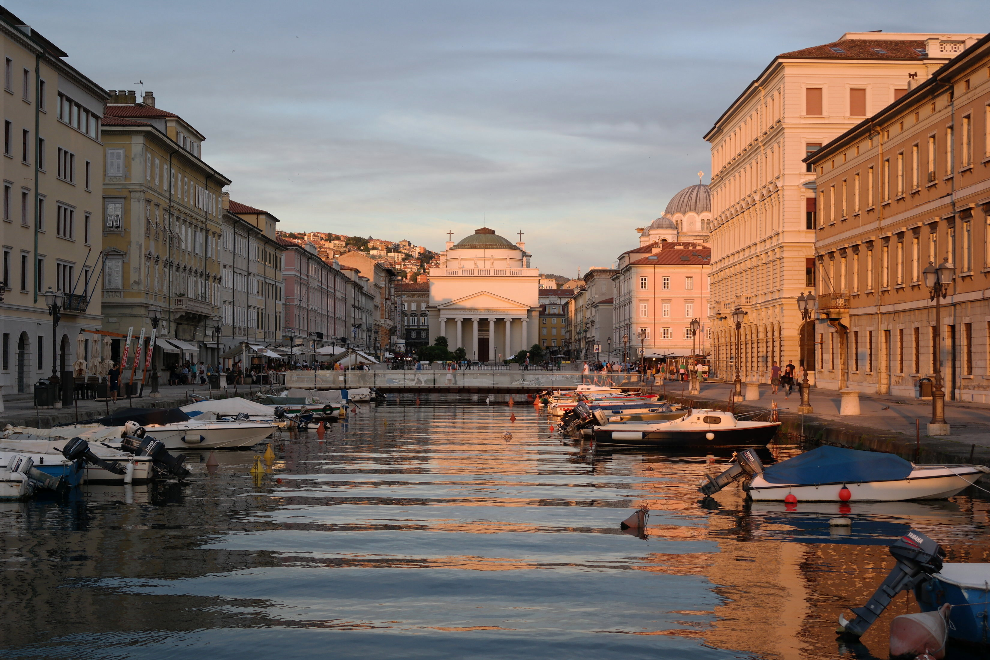 Canal Grande di Trieste al tramonto